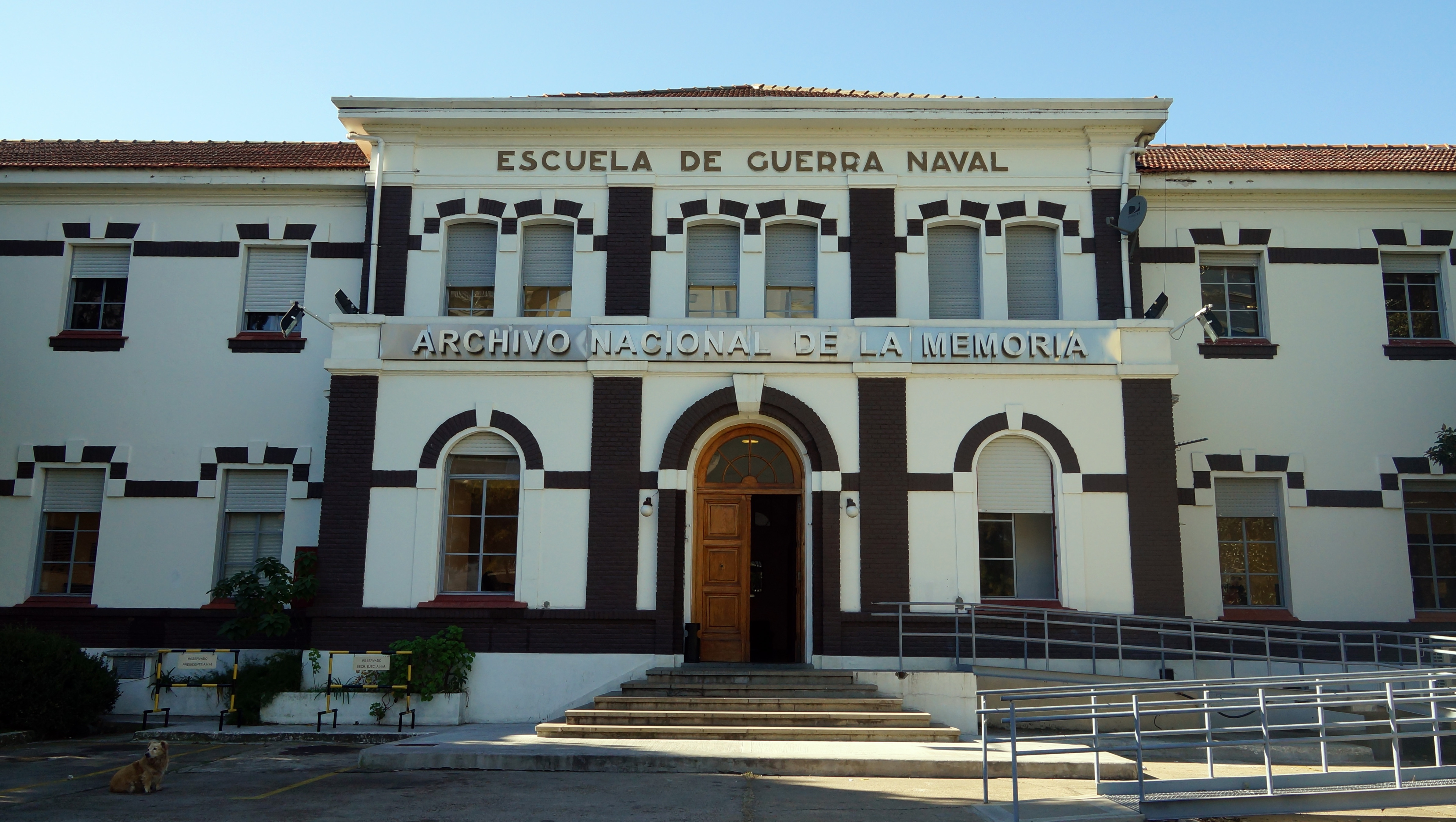 Escuela de Mecánica de la Armada, actual Espacio Memoria y Derechos Humanos.